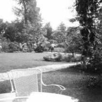 Bundesgartenschau 1957 in Köln - Hausgarten